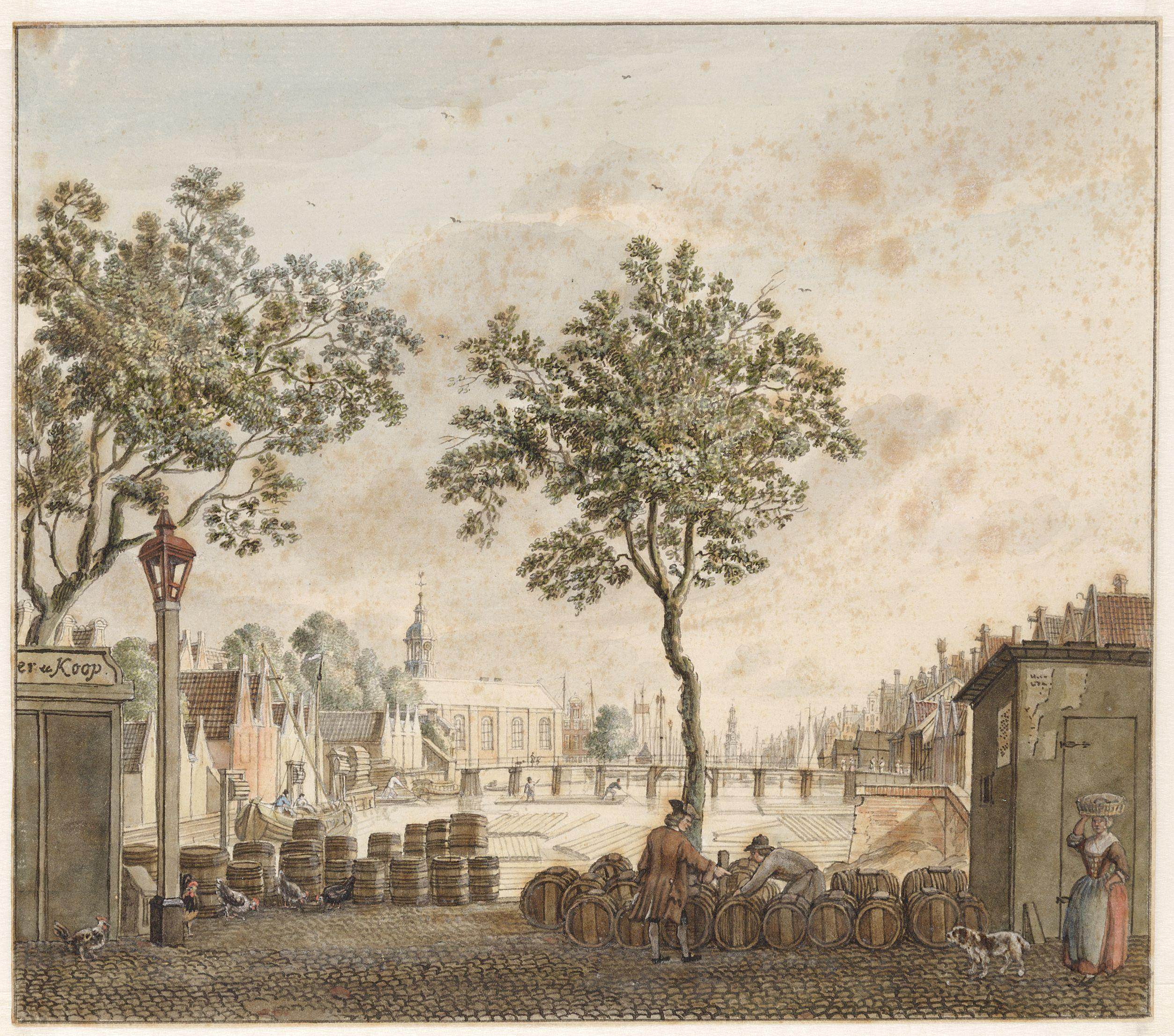 Beschrijving Gezicht vanaf de Nieuwe Teertuinen over de Eilandsgracht naar de Eilandskerk en de Haringpakkerstoren Links het Prinseneiland, rechts de Haarlemmer Houttuinen. In het midden de Dommersbrug, tussen Buiten Dommersstraat en Prinseneiland. Documenttype tekening Vervaardiger Beijer, Jan de (1703-1780) Collectie Collectie Atlas Splitgerber Datering 1757 t/m 1768 Geografische naam Eilandsgracht Haarlemmer Houttuinen Nieuwe Teertuinen Inventarissen Afbeeldingsbestand 010001000409